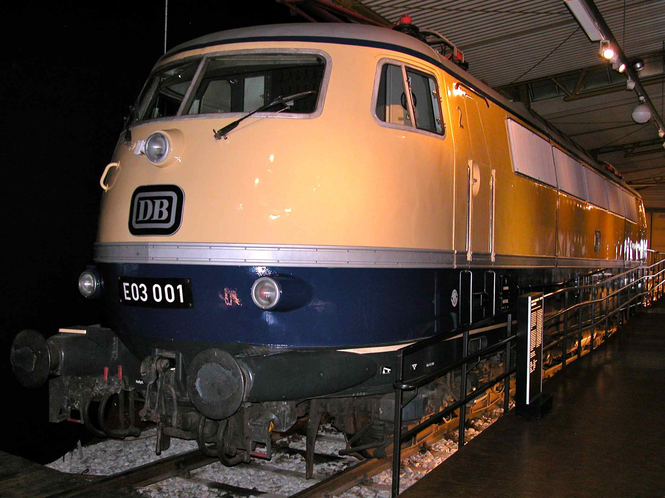 E03 001 in kobaltblau/beige in Nürnberg